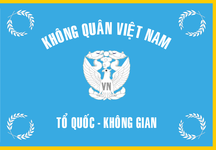 The flag of Flag of South Vietnam Air Force, used since 1955 to 1975.